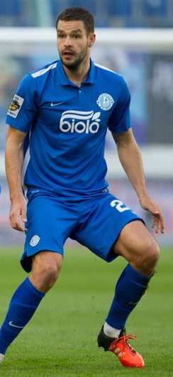 Євген Шахов - футболіст Дніпра